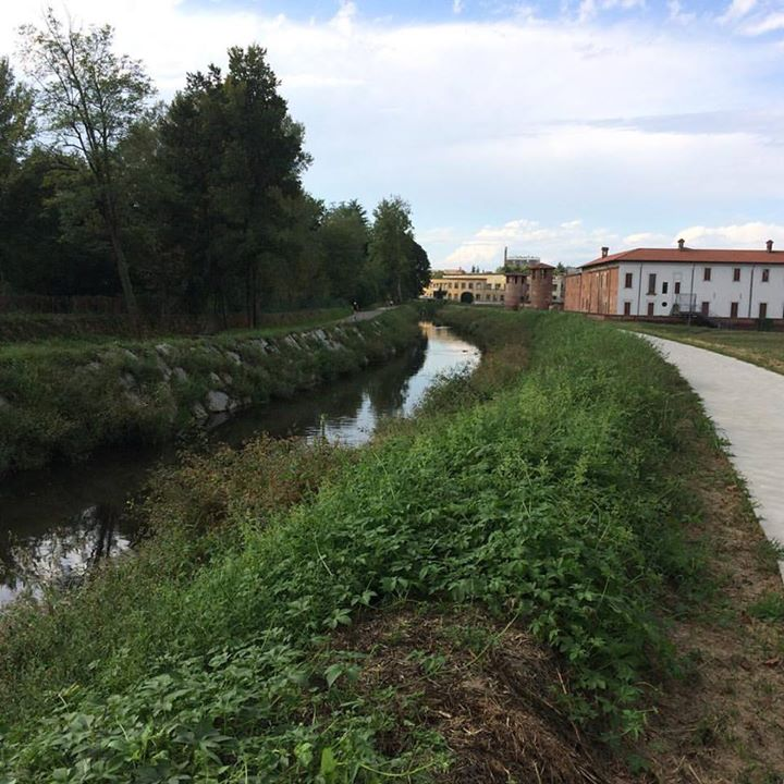 L'Olonella che costeggia il castello di Legnano